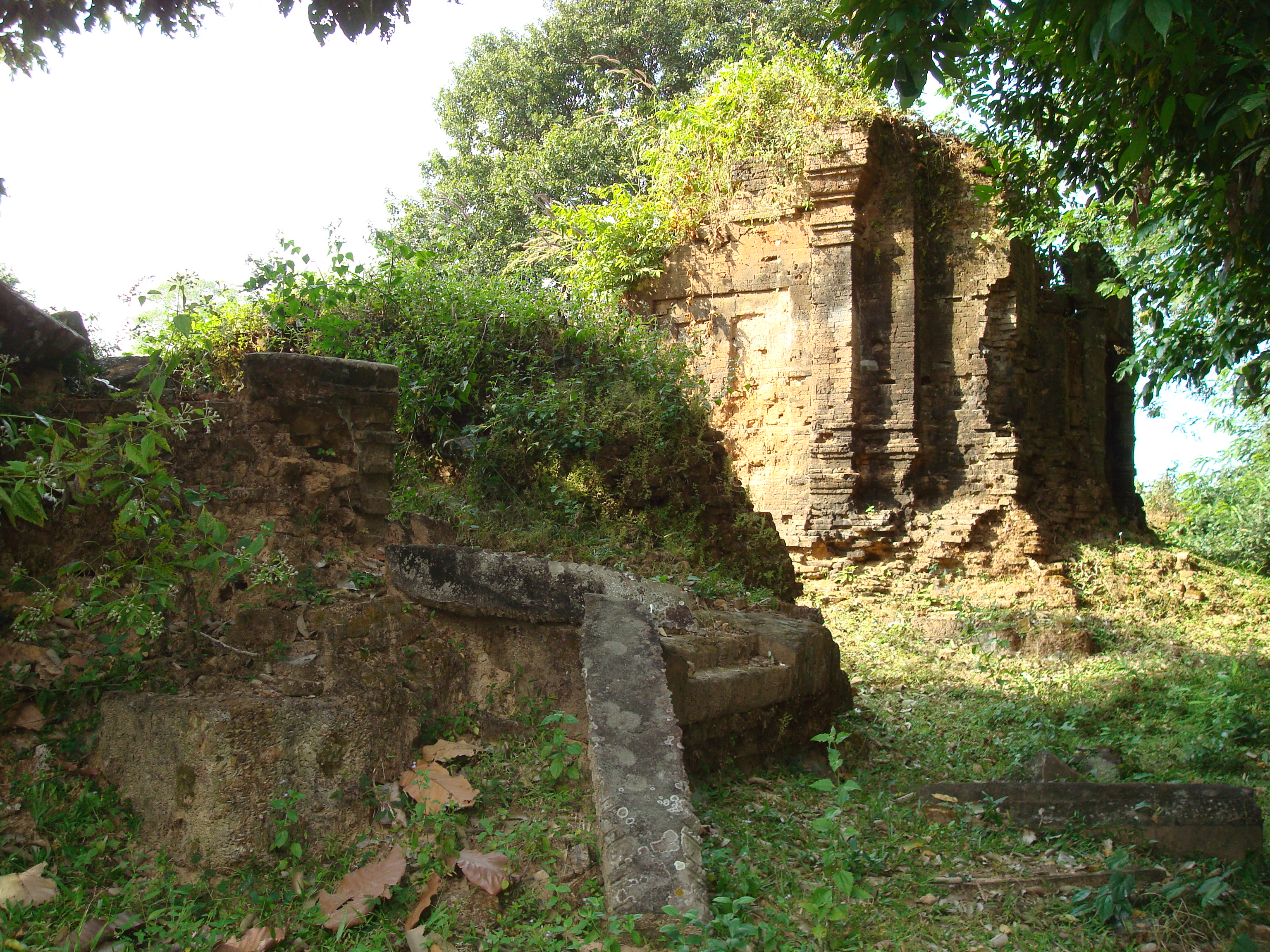 Überreste des südlichen und besser erhaltener mittlerer Turm von Kutisvara